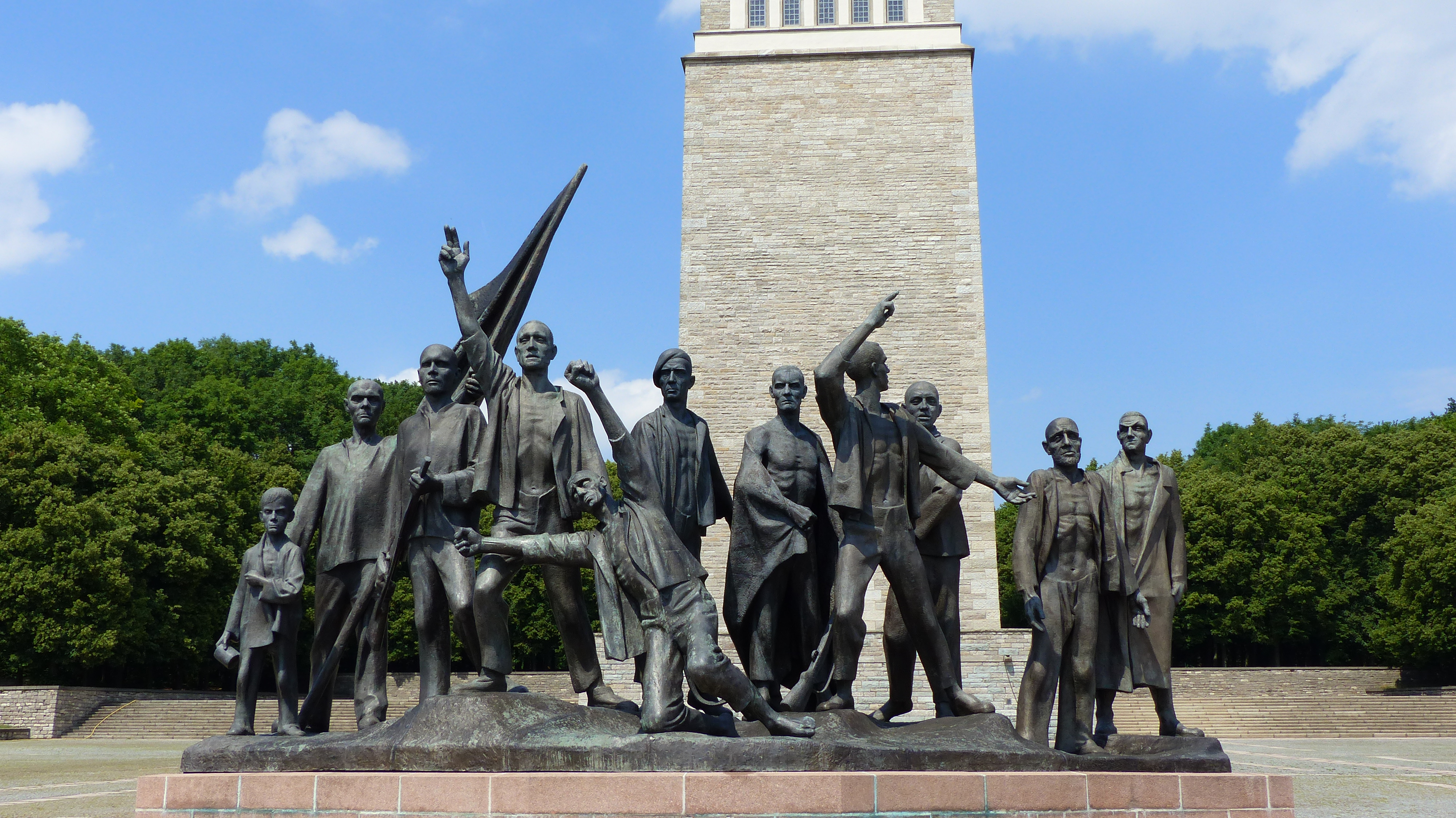 Gedenkstätte Buchenwald, Weimar